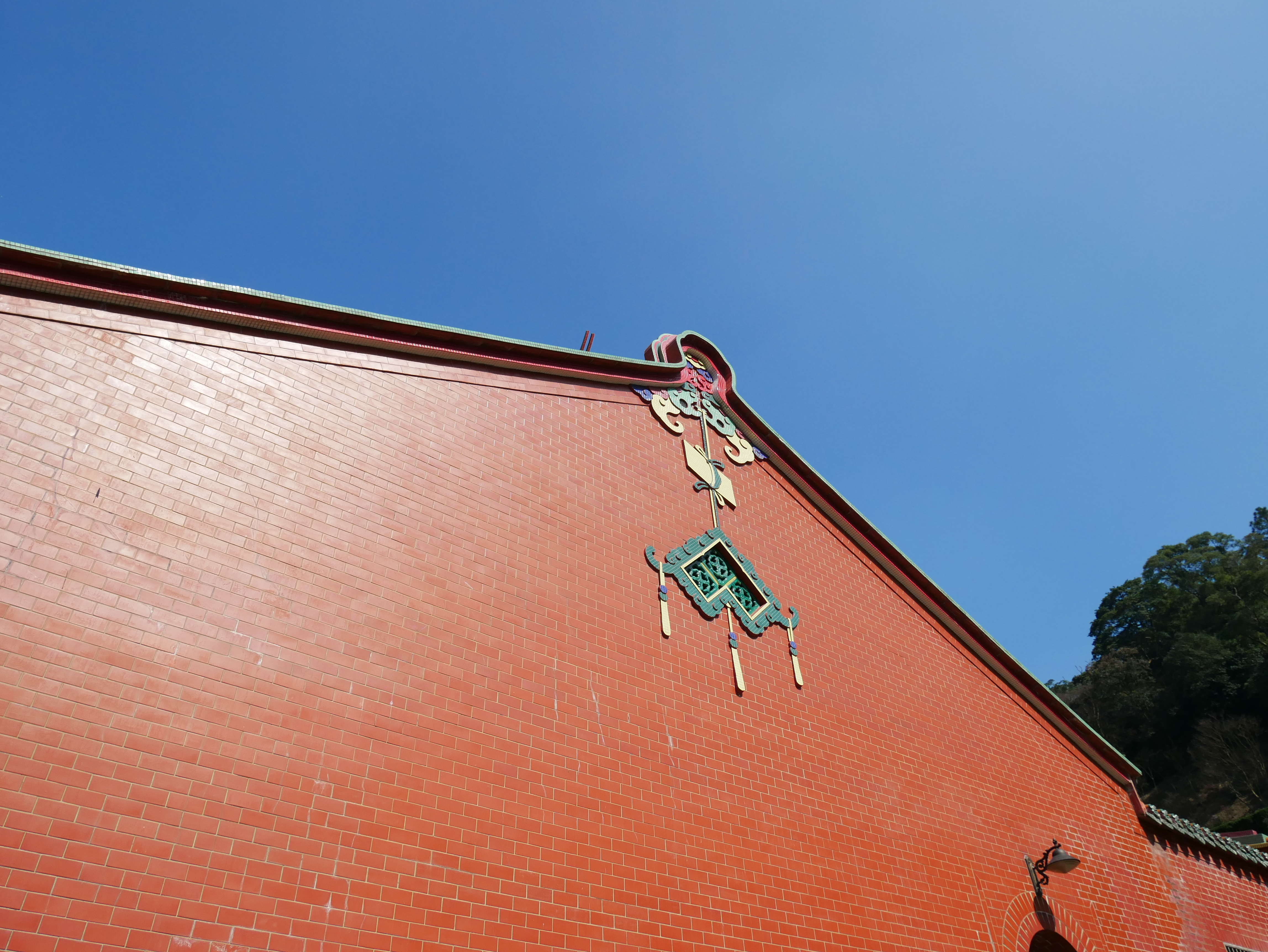 行修宮（行天宮三峽分宮）木形馬背，新北市三峽區嘉添里